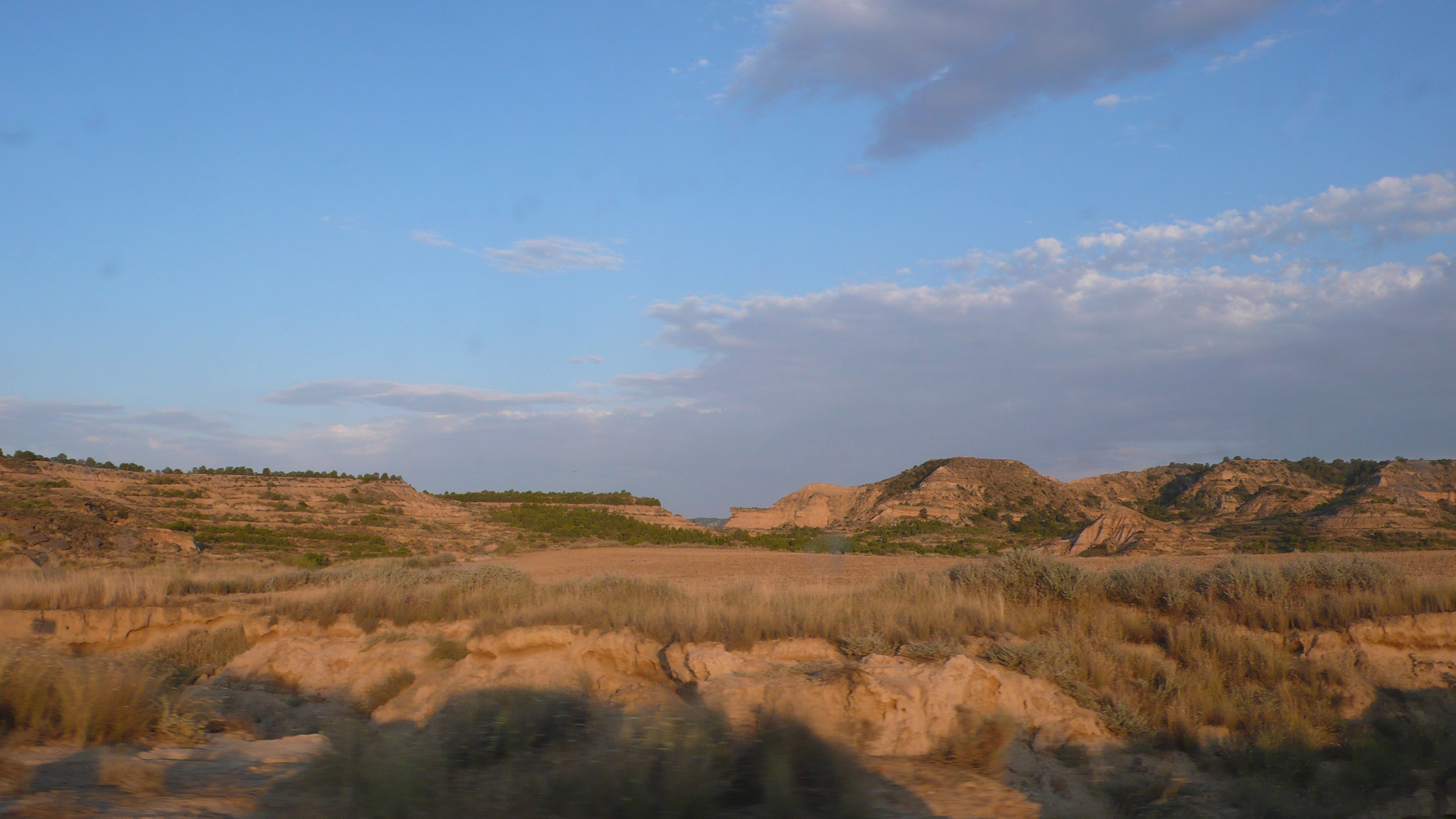 Monegros